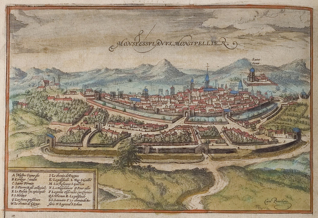 Montpellier